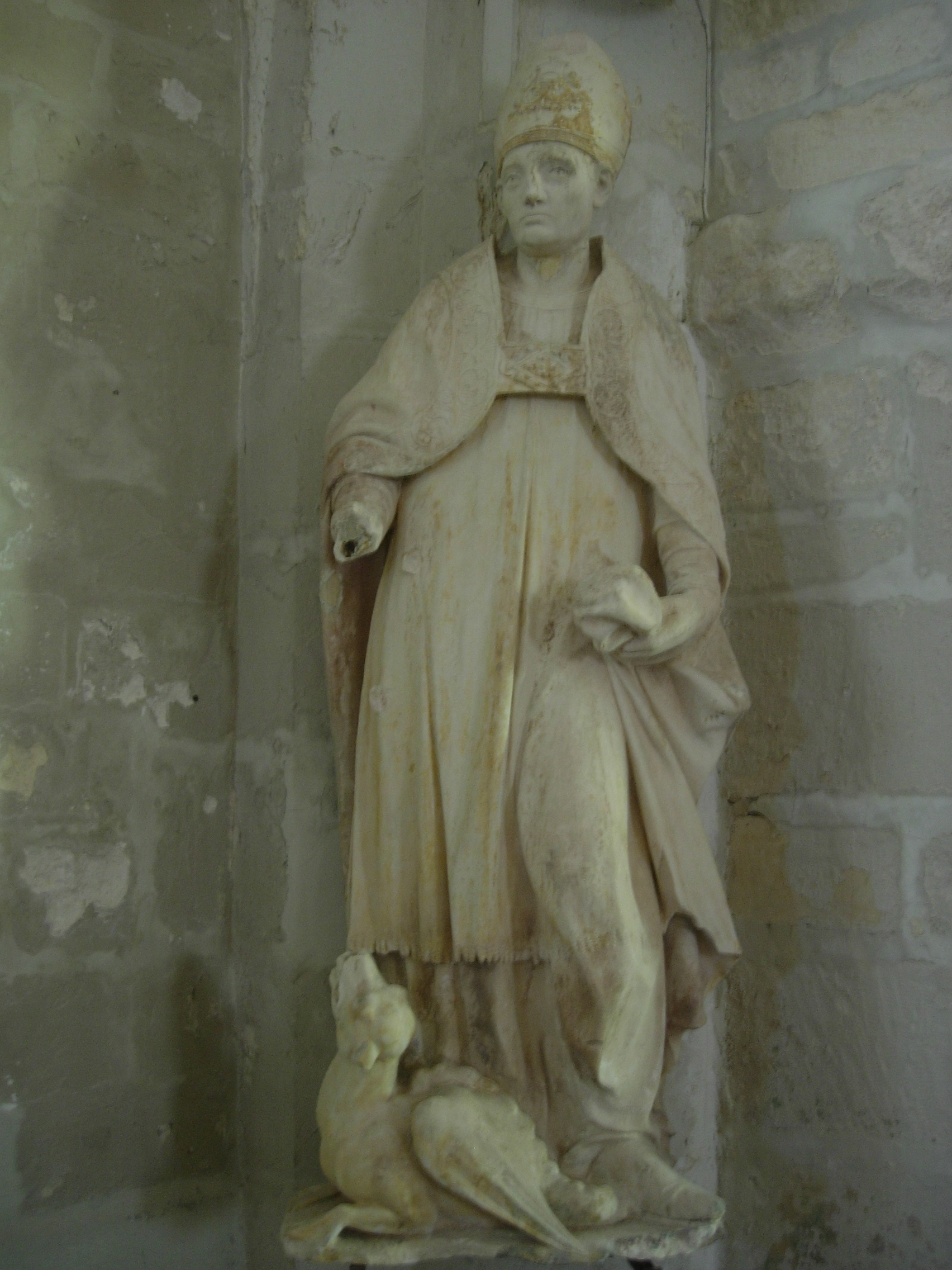 Statue de Saint-Loup, évêque de Troyes, écrasant le dragon "La Chair Salée" (représentation d'Attila) : église d'Estissac (Aube)